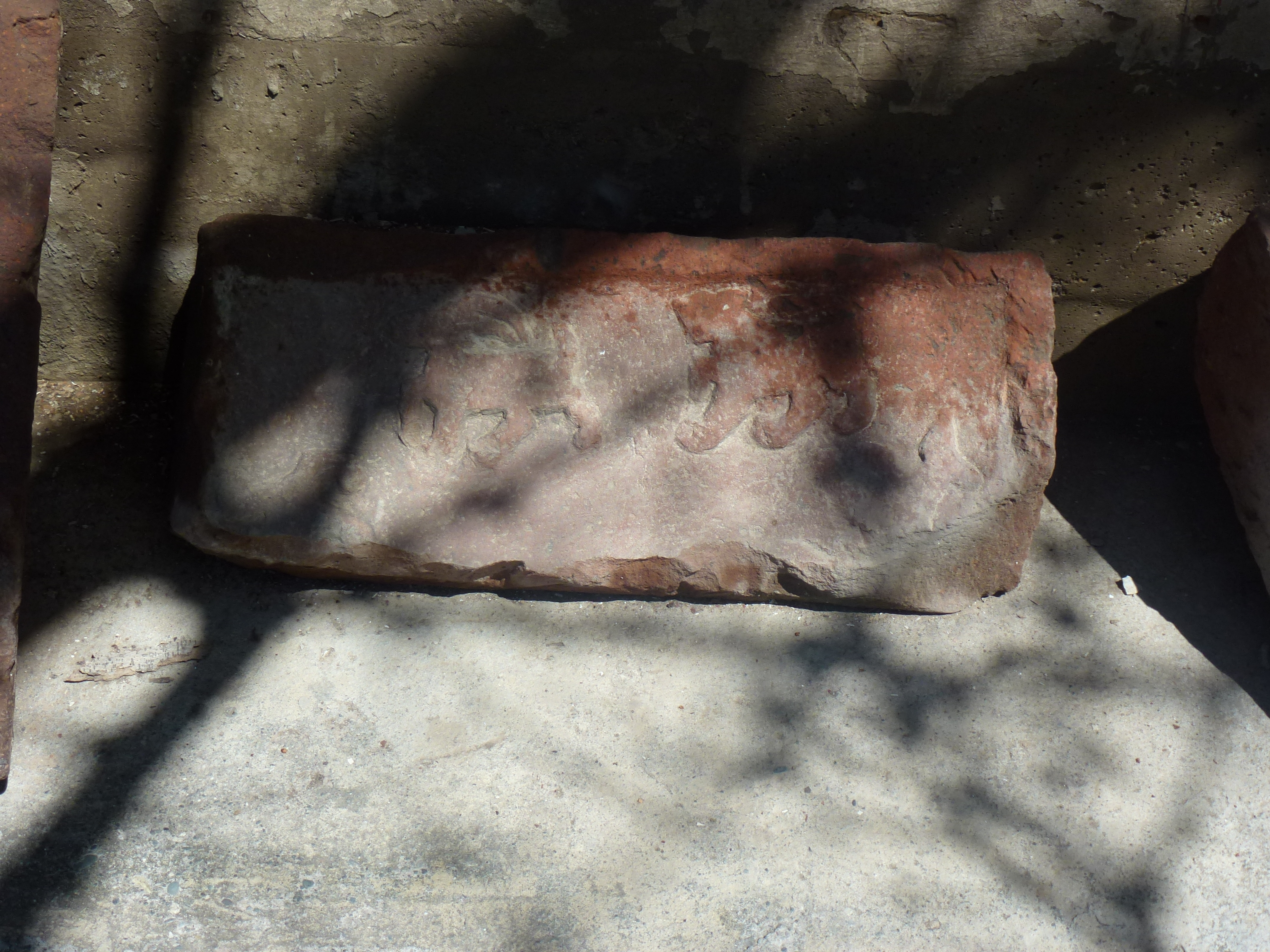 Դվինի ավերակներ, Հայաստան 53/1